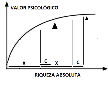 funcion utilidad dinero